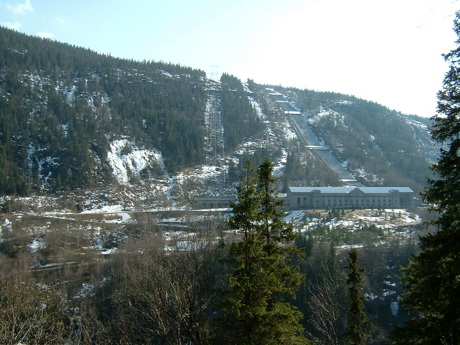 Het Vermork complex bij Rjukan (Noorwegen) - eigen foto, mei 2006